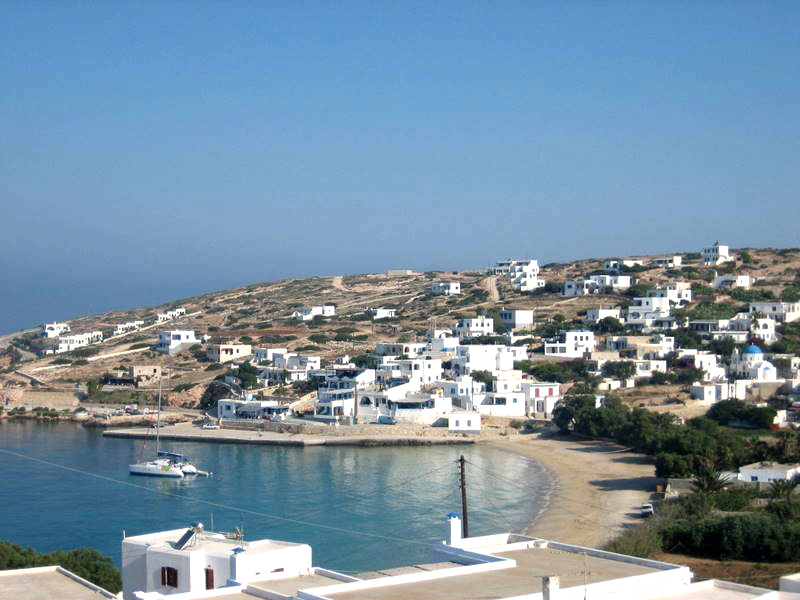 Der Hauptort auf der Insel Donousa